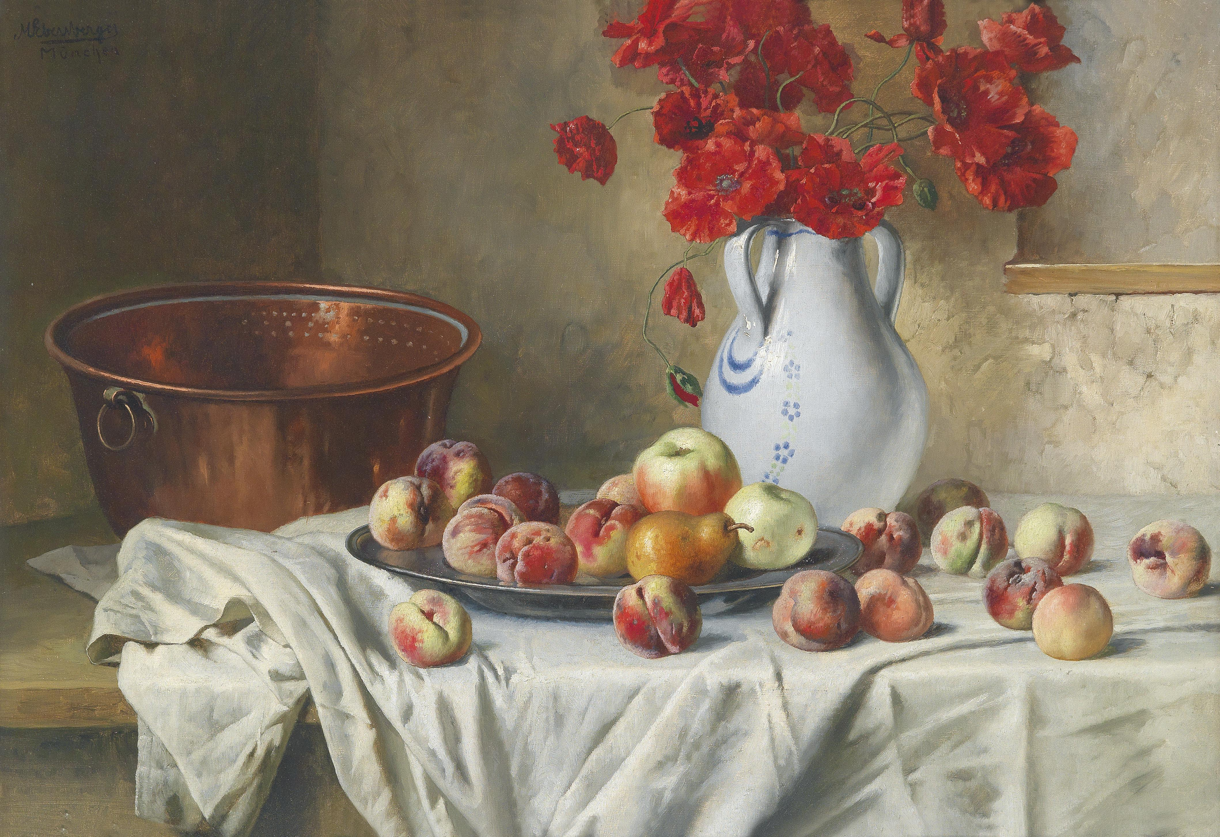 Stillleben mit Äpfeln und Mohnblumen im Krug, signiert und bezeichnet M. Ebersberger München, Öl auf Leinwand, 70 x 100 cm